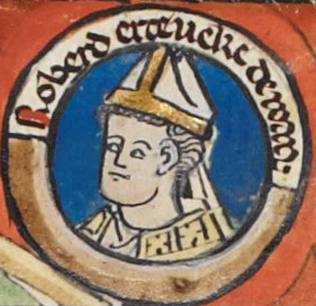 Miniature de Robert le Danois dans une généalogie royale du XIVe siècle.